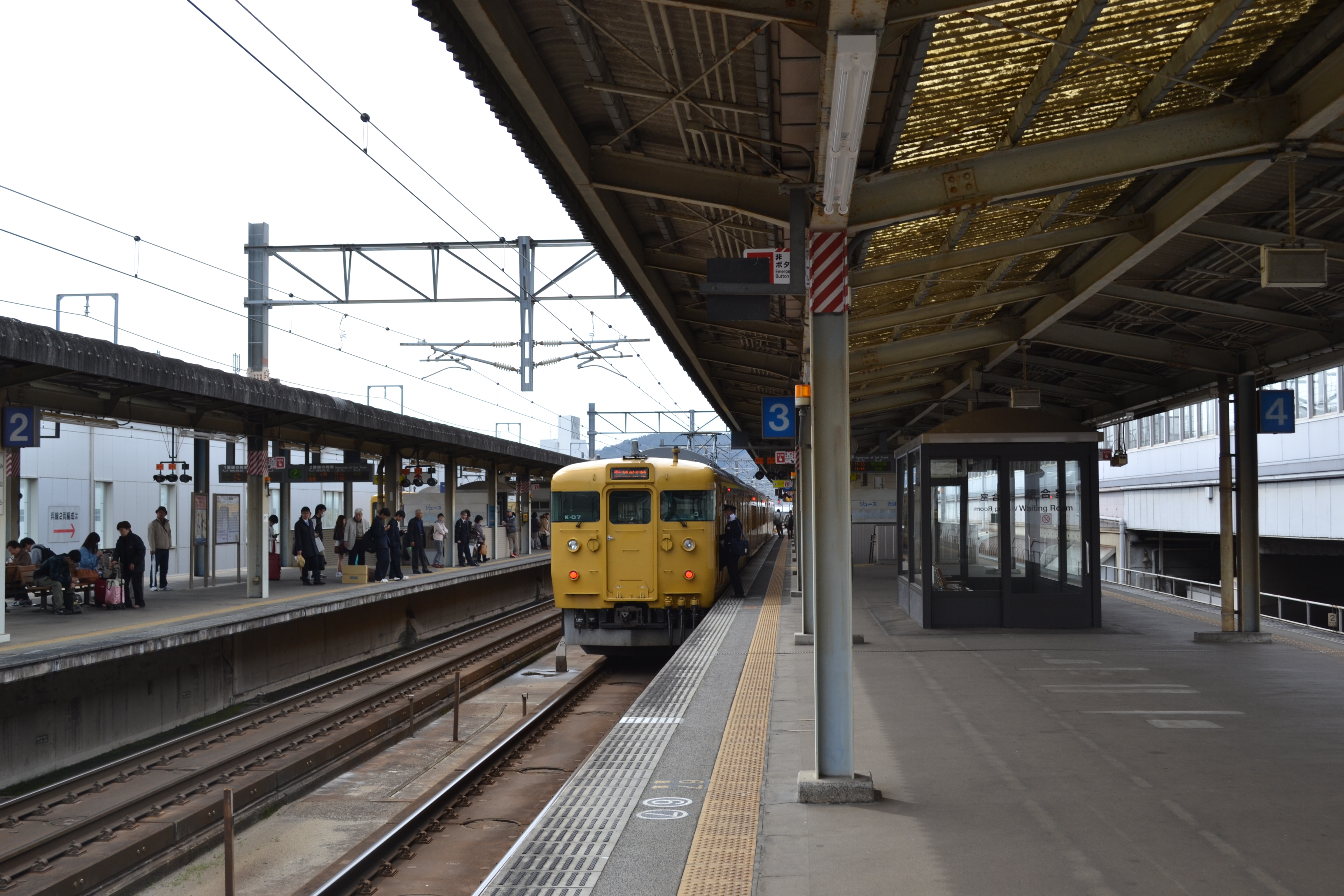 三原駅プラットホーム